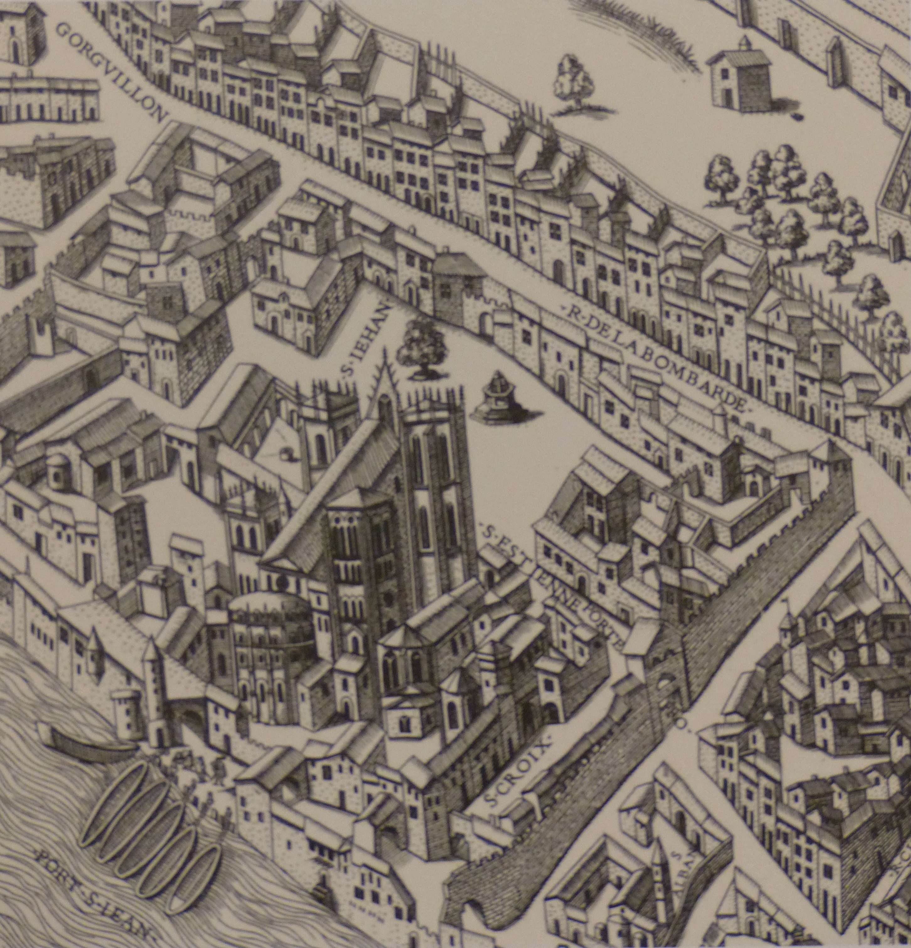 Groupe épiscopal de Lyon : cathédrale Saint-Jean, église Saint-Étienne et église Sainte-Croix. Dessin anonyme de 1550 (1876 facsimilé).